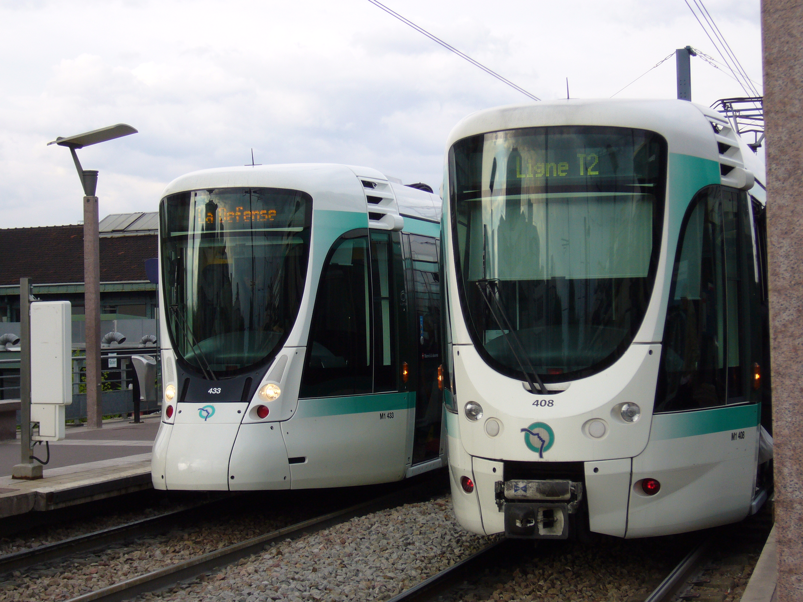 Citadis 302 nouvellement livré à coté d'un ancien Citadis, sur la ligne 2 du tramway d'Île-de-France.